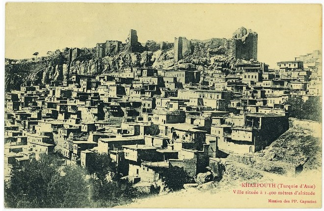 Geçen yüzyılın başında Harput